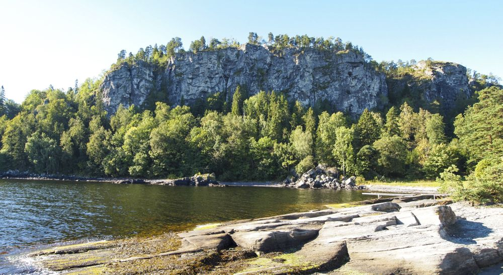 Østre Veggbukt er en ideell hekkeplass for rovfugl, og har derfor klatreforbud.